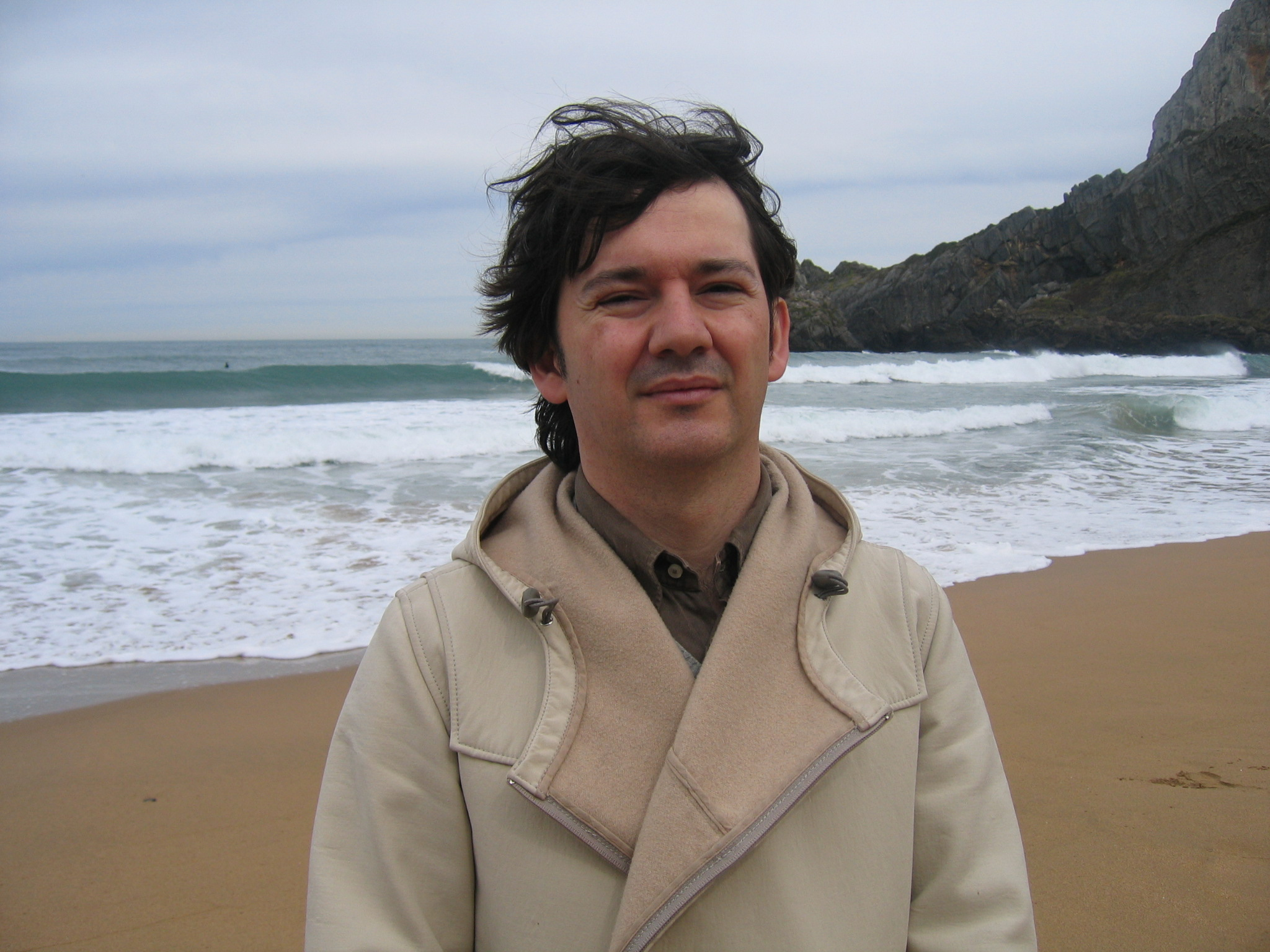 Rodrigo Muñoz Avia en la playa de Laga (Ibarrangelu), 2008.